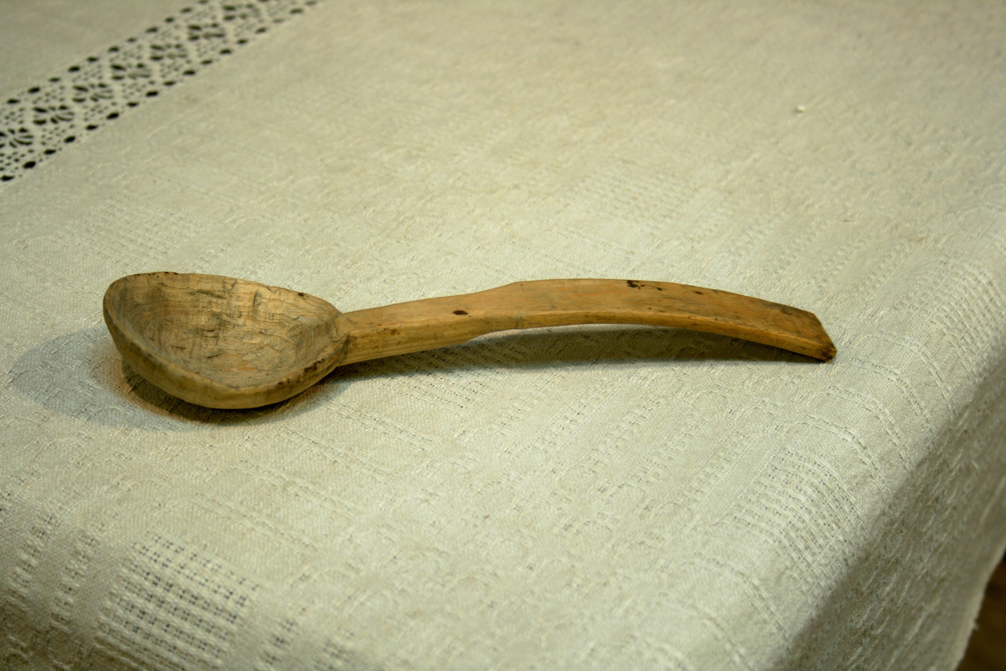 Деревянная ложка. Экспозиция Шебекинского музея.